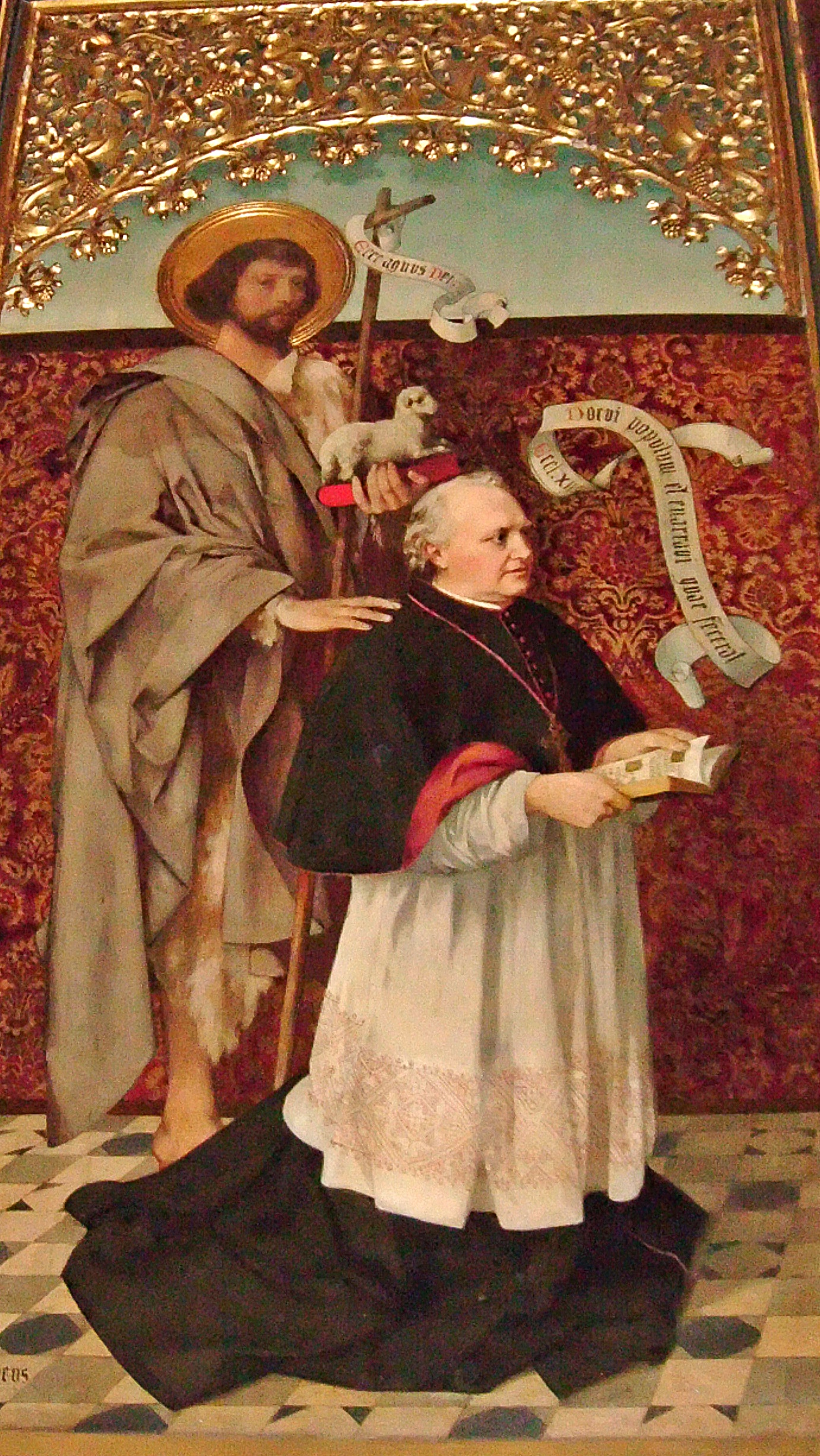 Der Priesterhistoriker Johannes Janssen (1829-1891) mit seinem Namenspatron St. Johannes, auf einem Altarbild von Heinrich Nüttgens, im Frankfurter Dom